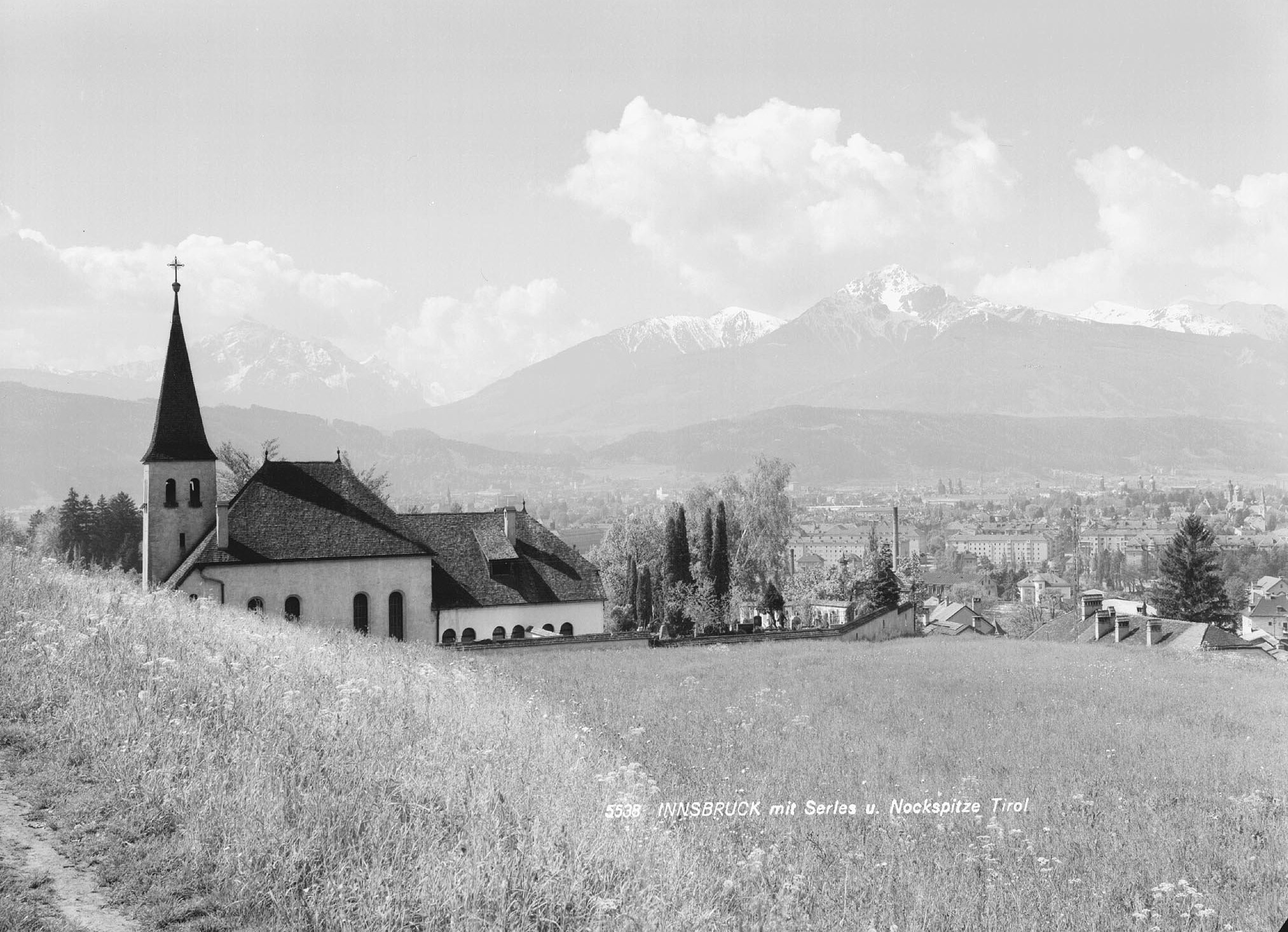 Mühlauer Friedhof mit Serles und Nockspitze / Tirol